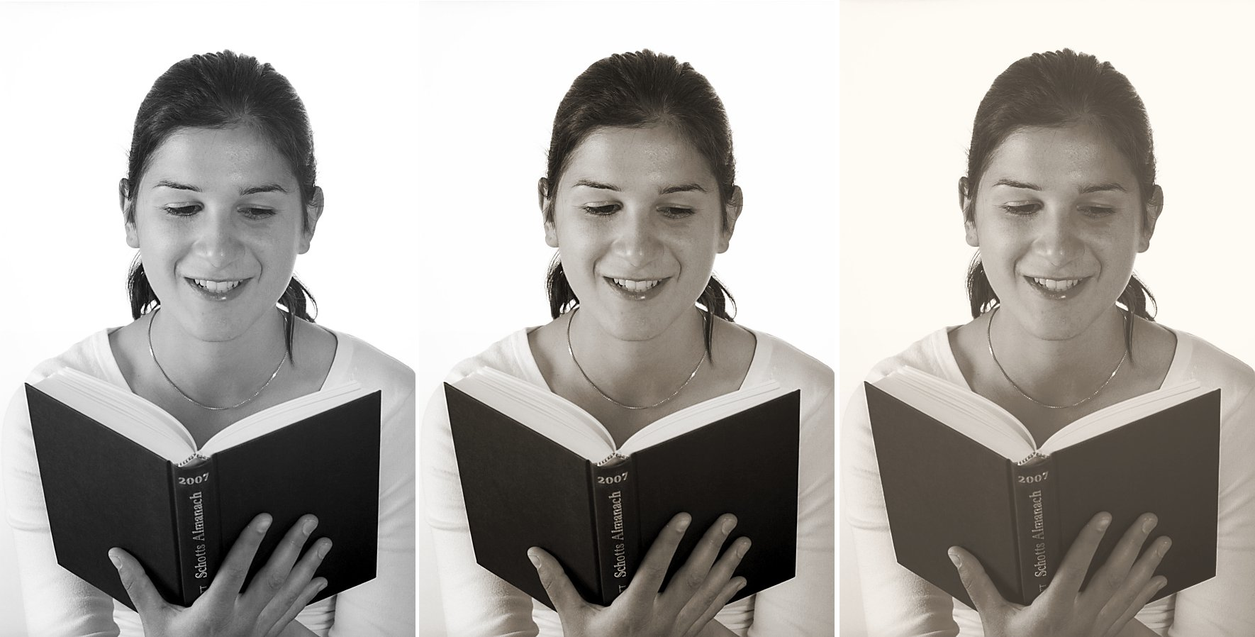 Beispiel für Sepia und (simuliertes) Vergilben